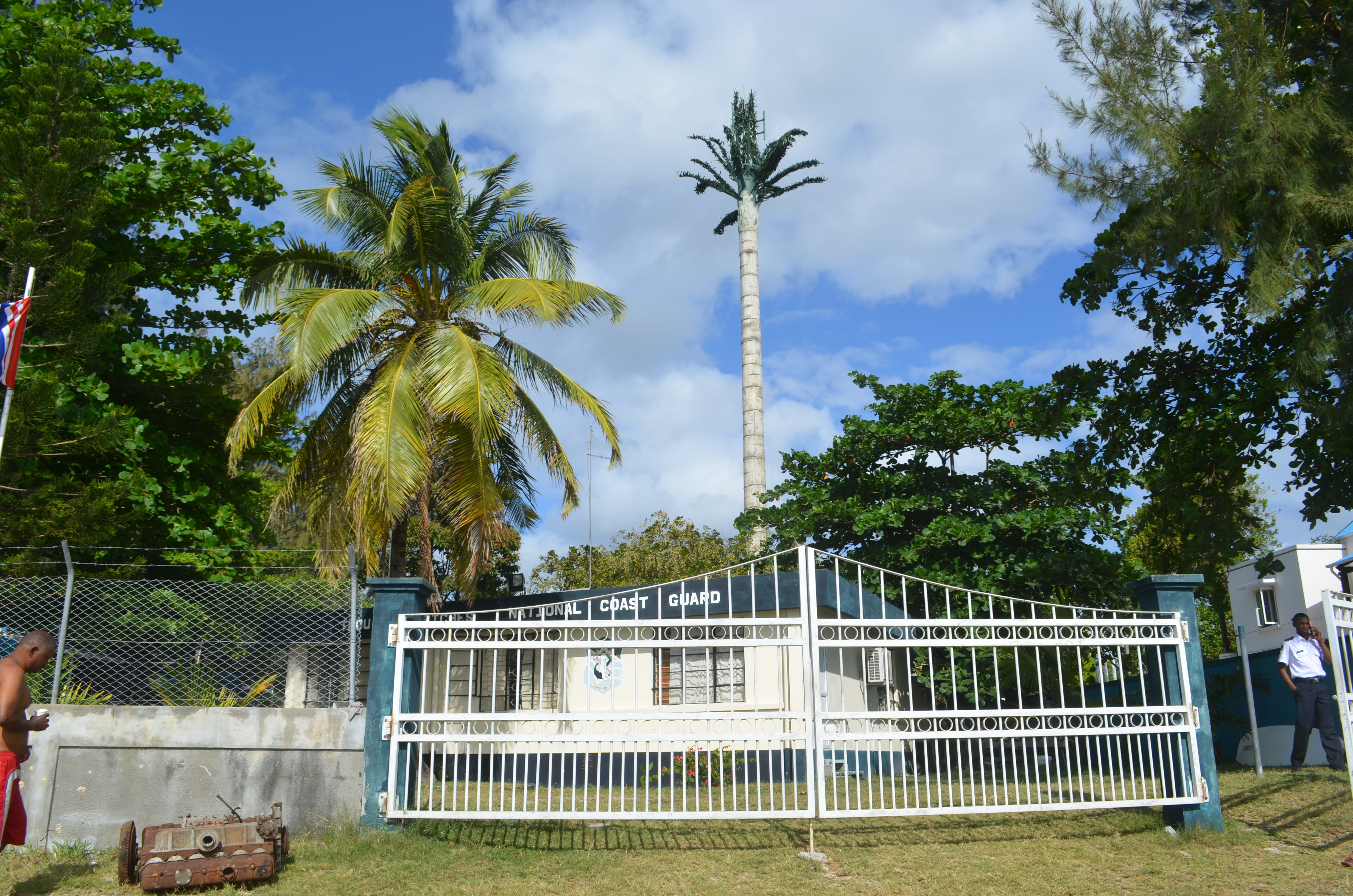 Trou aux Biches, National cost guard